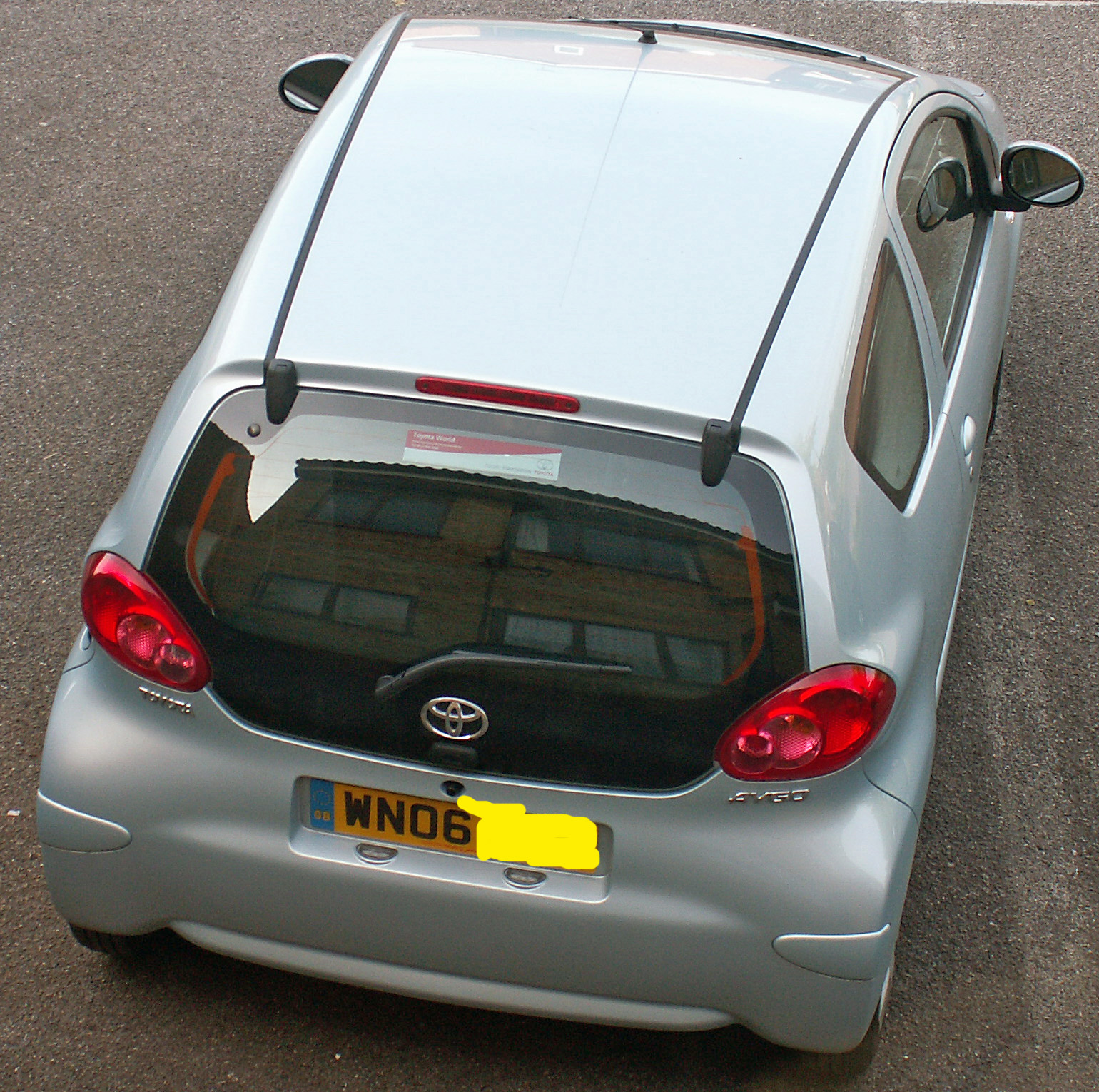 Toyota Aygo